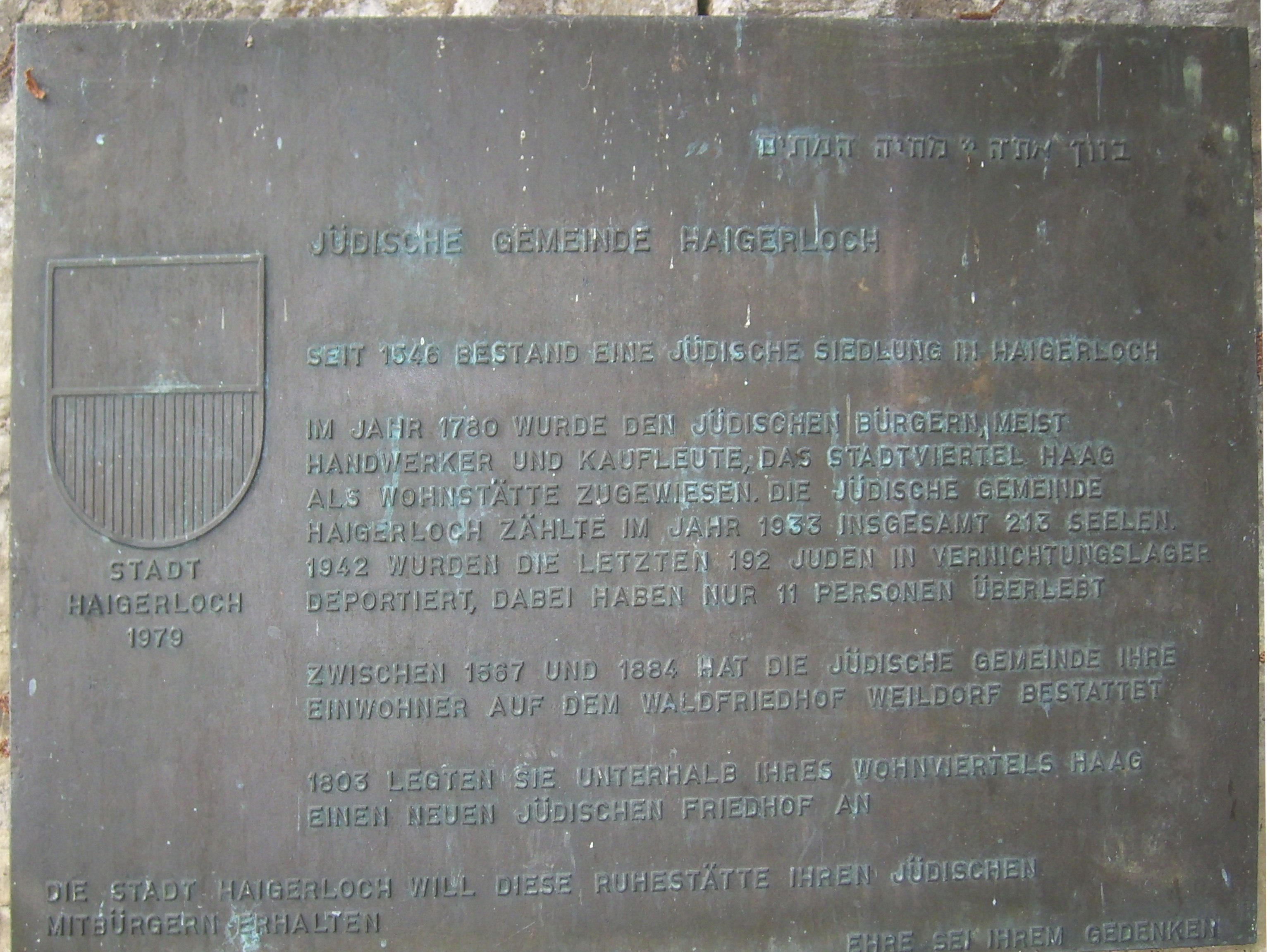 Haigerloch Jüdischer Friedhof -Gedenkplakette